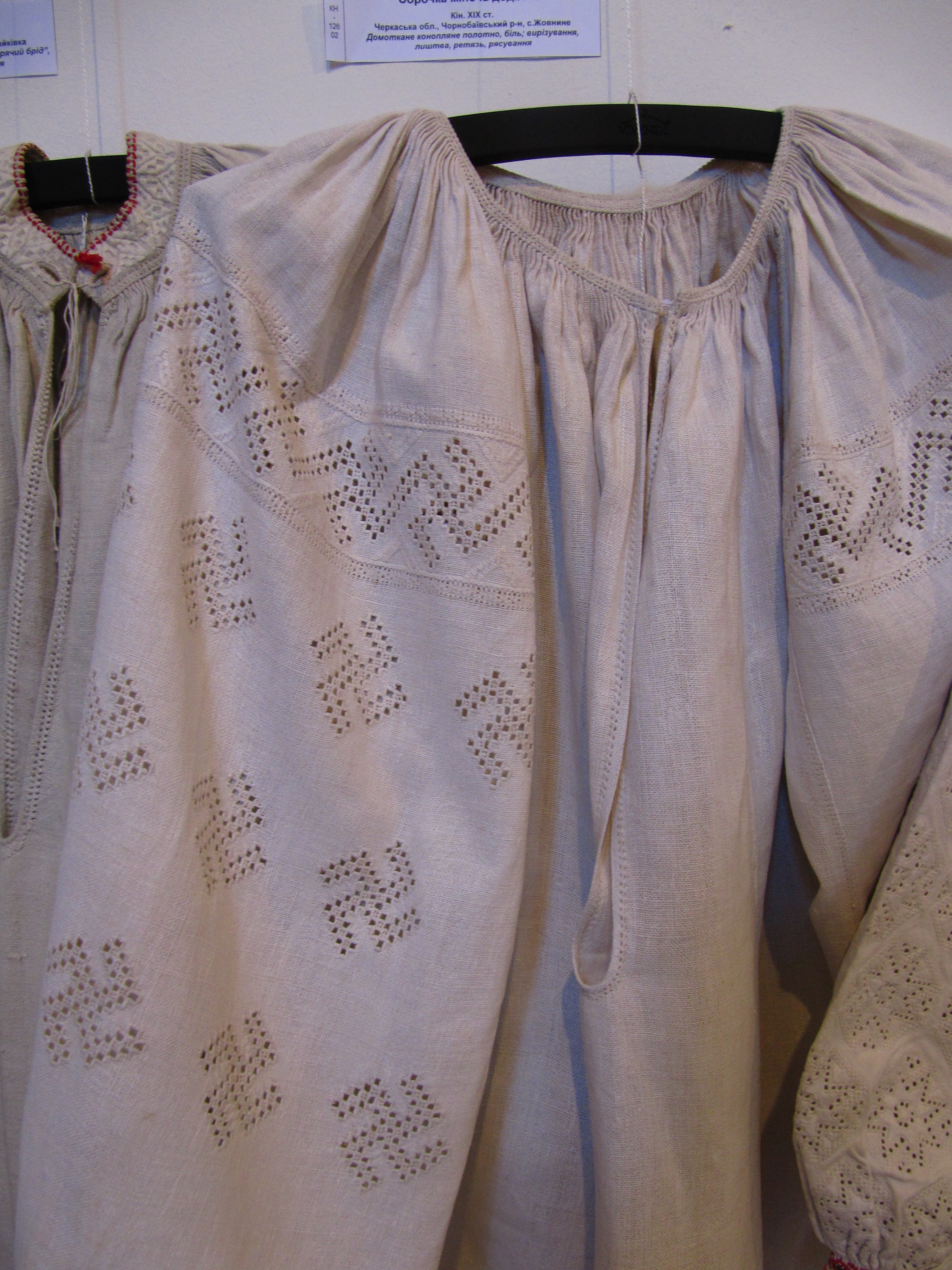 Жіноча сорочка додільна. Черкаська обл. Чорнобаївський р. с. Жовнине. Виставка в музеї Івана Гончара (Київ).